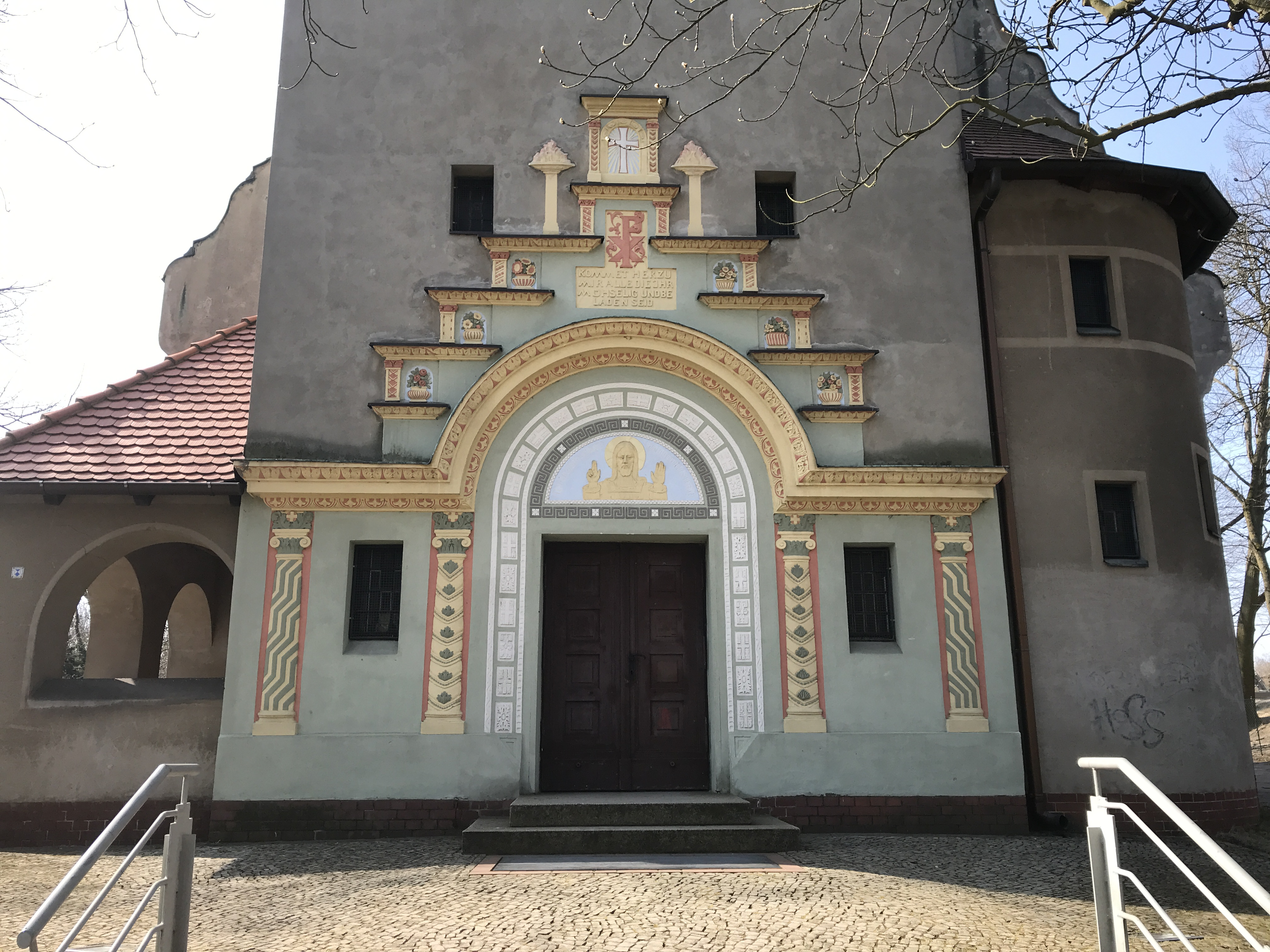 Die Friedenskirche in Wildau im Landkreis Dahme-Spreewald im Land Brandenburg entstand in den Jahren 1908 bis 1911 nach Plänen des Königlichen Baurats Georg Büttner im Jugendstil.